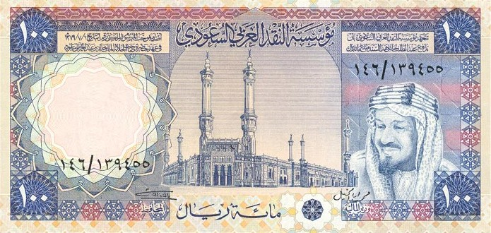 100 риалов. Саудовская Аравия, обр. 1976. Аверс.